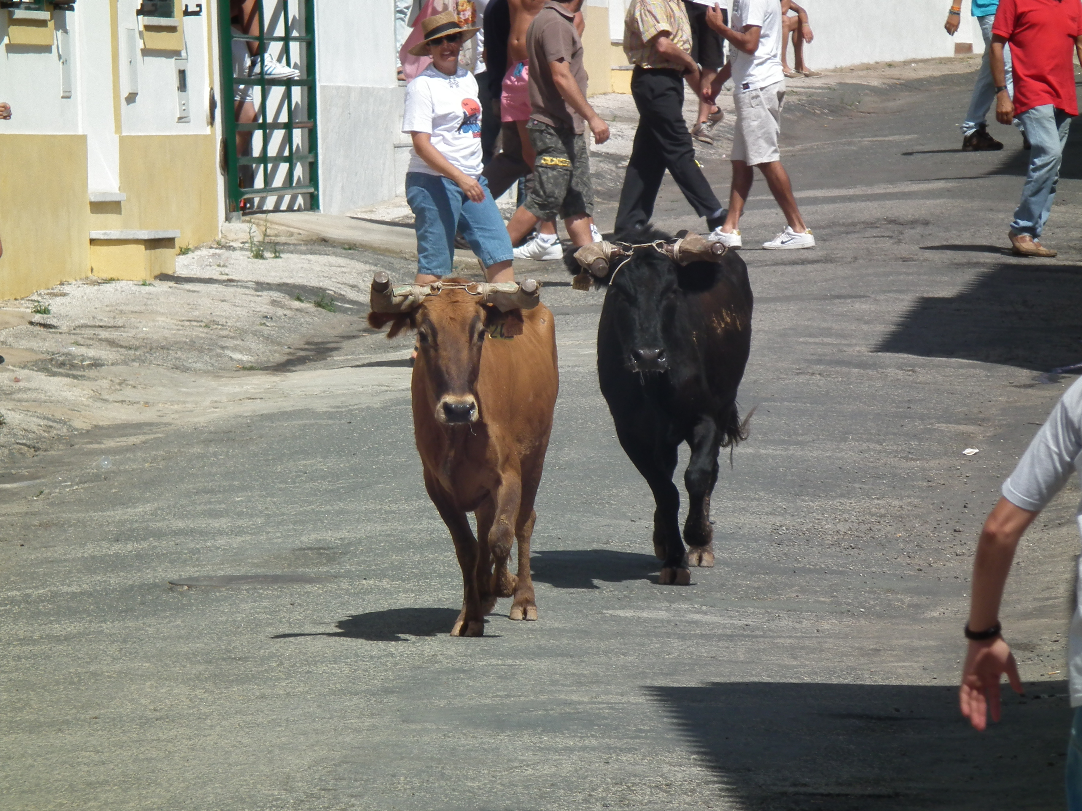 Largada de rua em Santo Aleixo da Restauração - Tomina 2011.